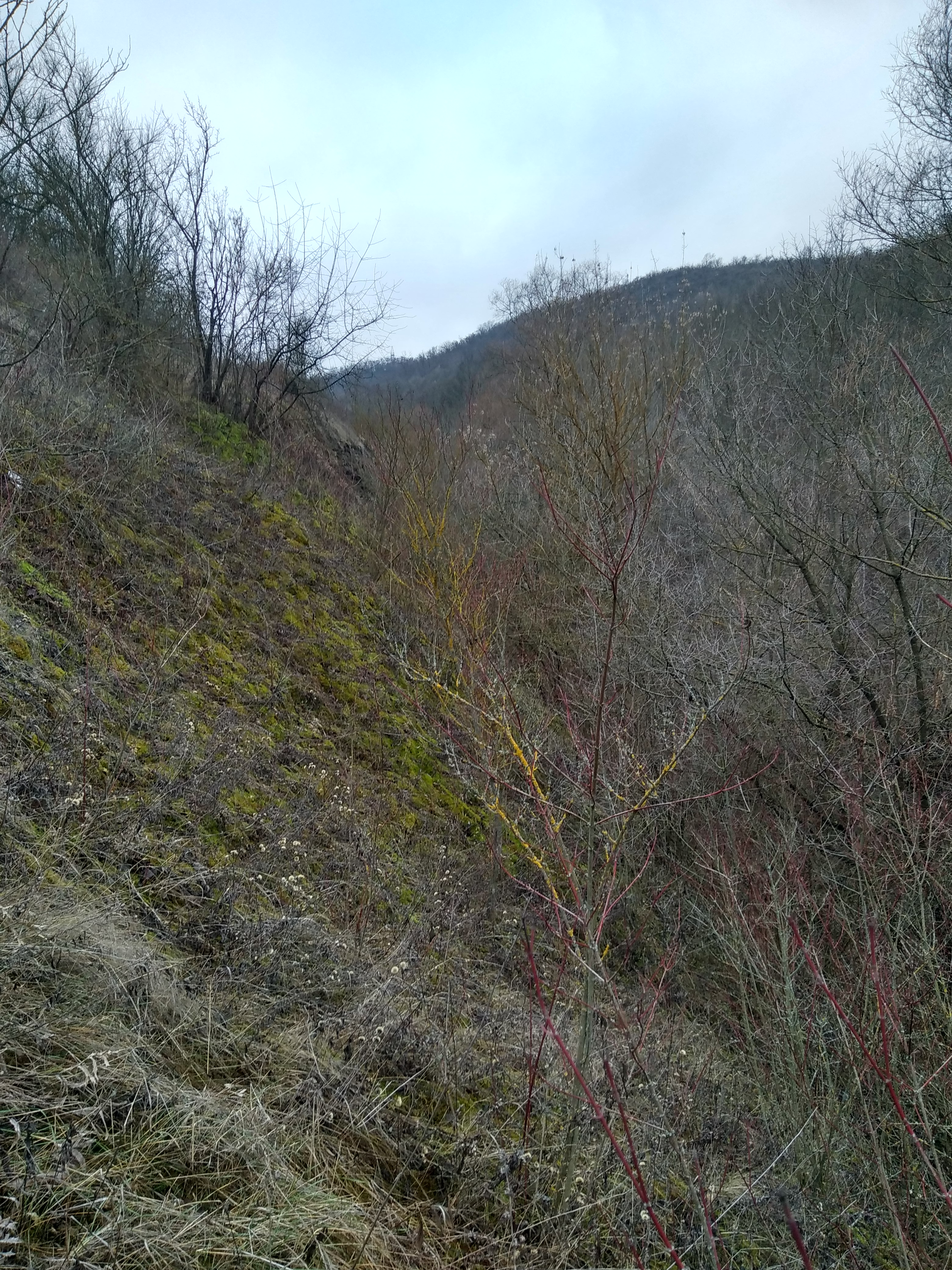 Râpa „La Izvoare”, monument al naturii amplasat în raionul Ocnița, la sud de orașul Otaci (cod MD-OC-mn.A-053) A-053